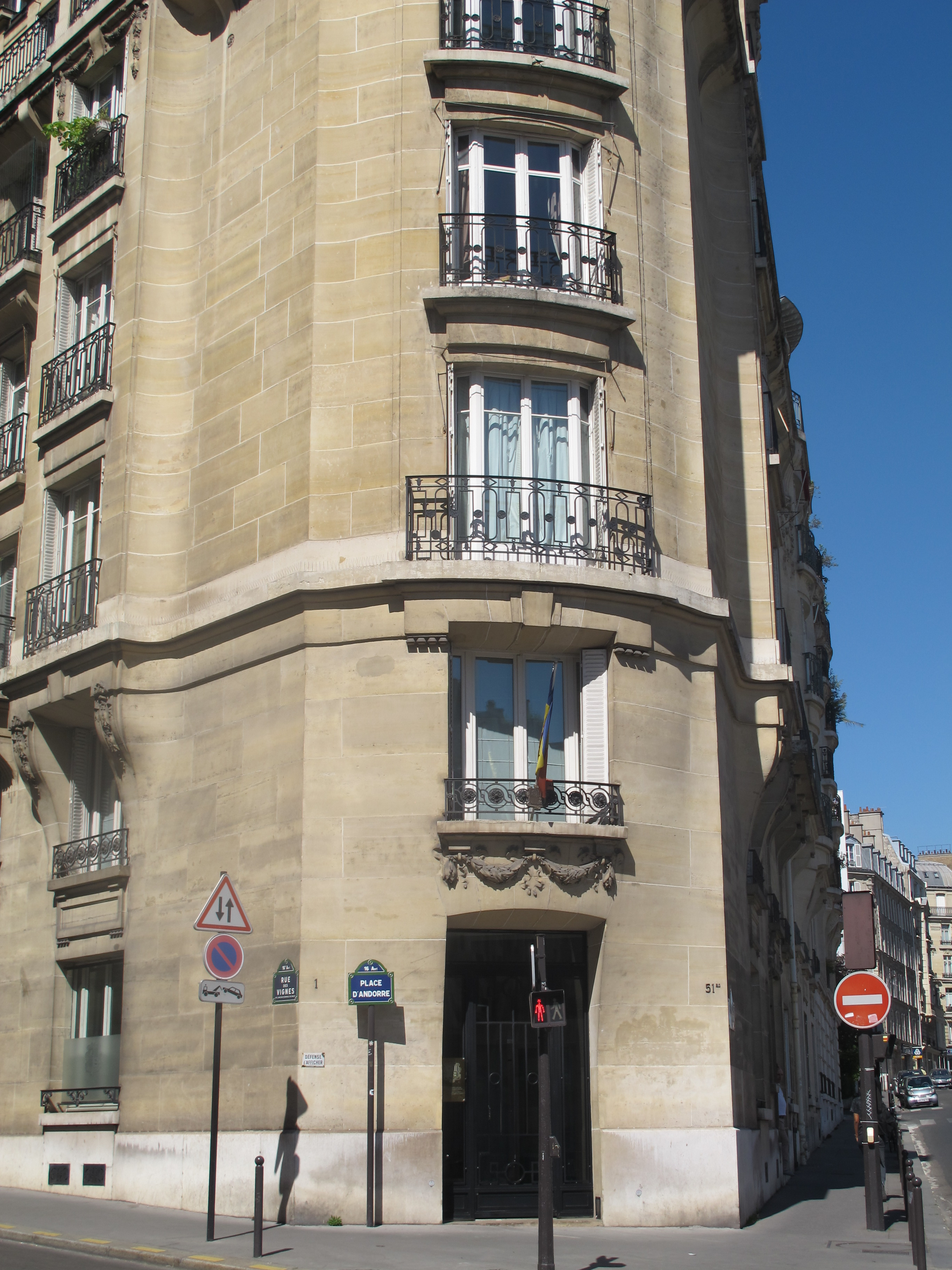 Ambassade d'Andorre en France, 1, place d'Andorre (Paris, 16e).